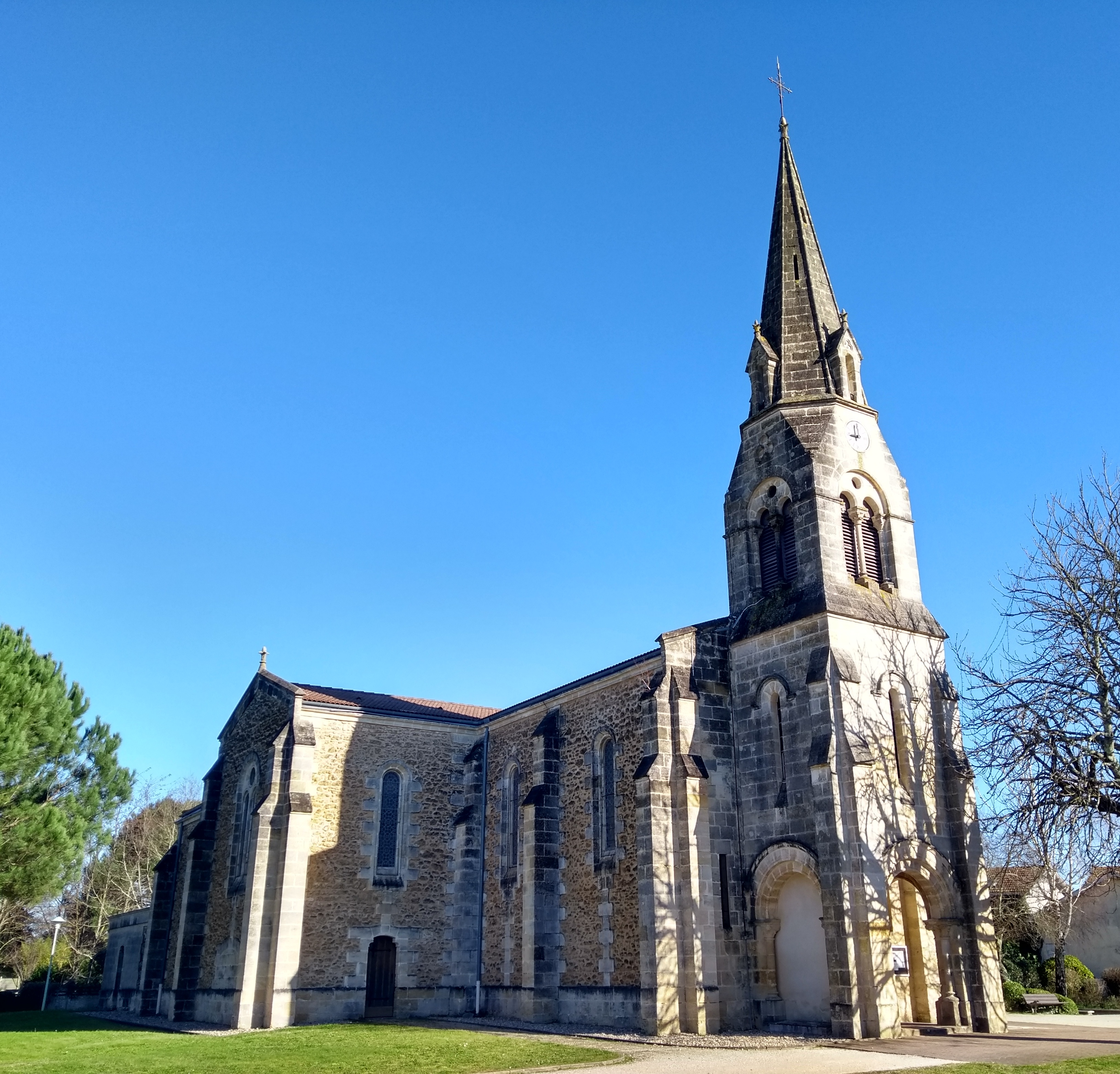 Église Saint-Gervais de Biganos